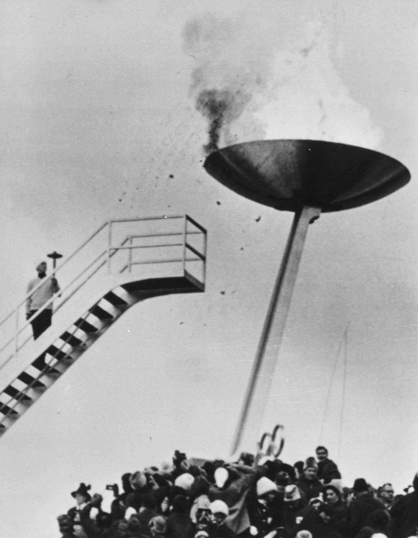 Olympische Winterspelen te Innsbruck geopend, Josl Rieder steekt het Olympisch vuur aan